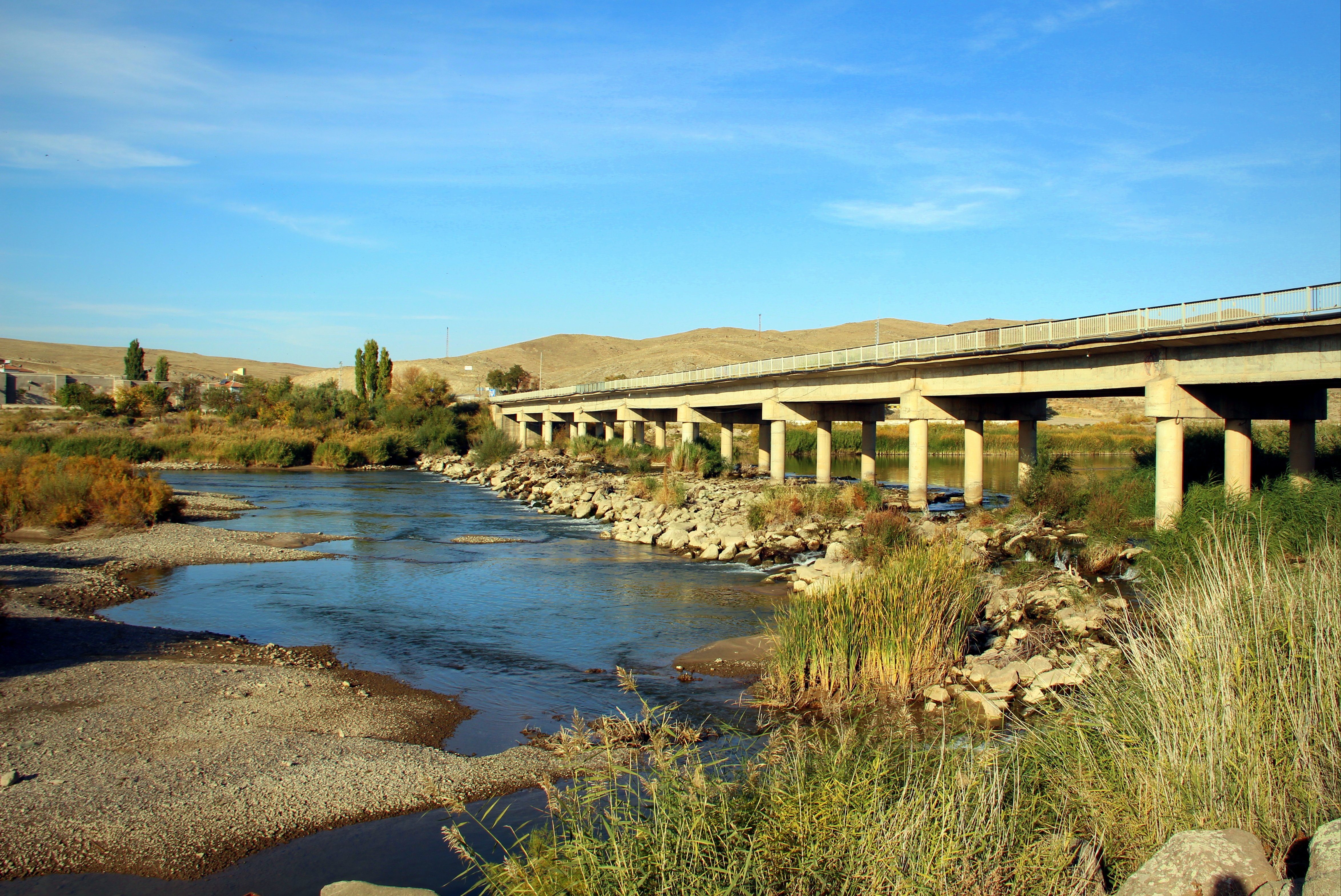 Kesikkopru Bridge